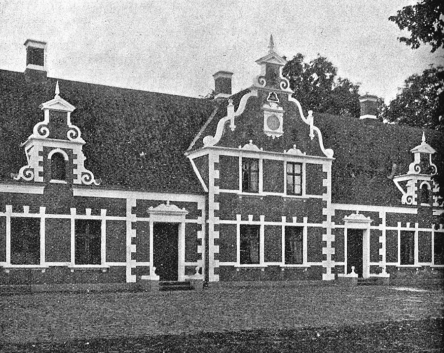 Kærbygård er en herregård beliggende i Kasted Sogn, Århus Kommune (Hasle Herred - Århus Amt).